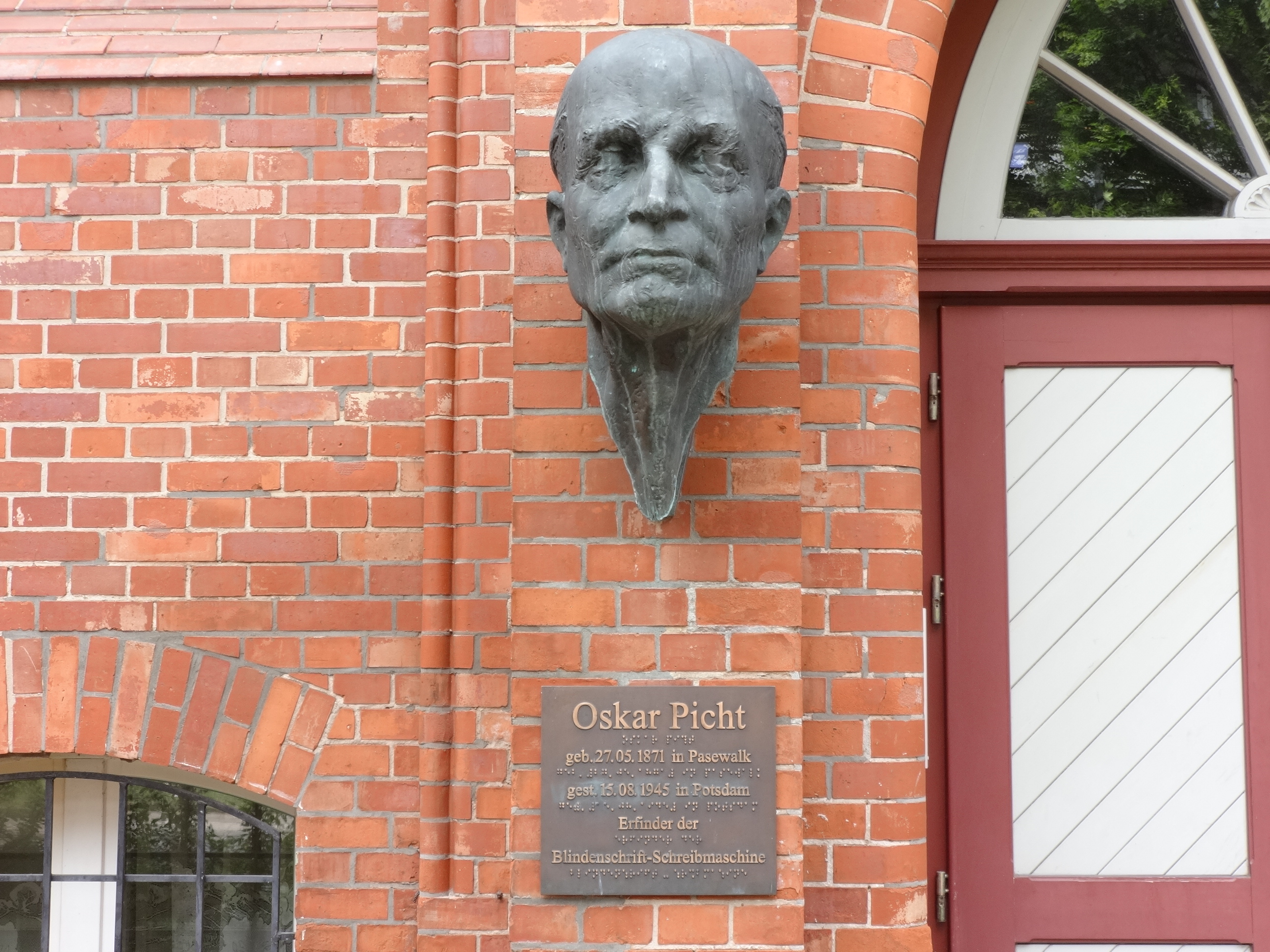 Bronzene Büste von Oskar Picht am gleichnamigen Gymnasium in Pasewalk, Mecklenburg-Vorpommern